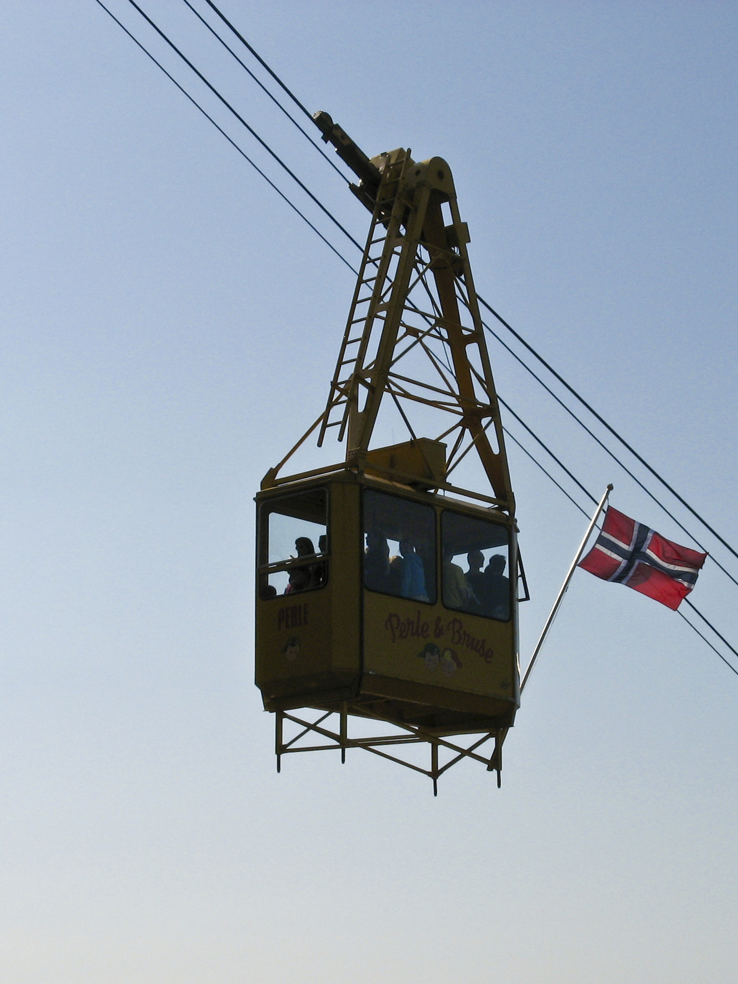 De gondel Perle.